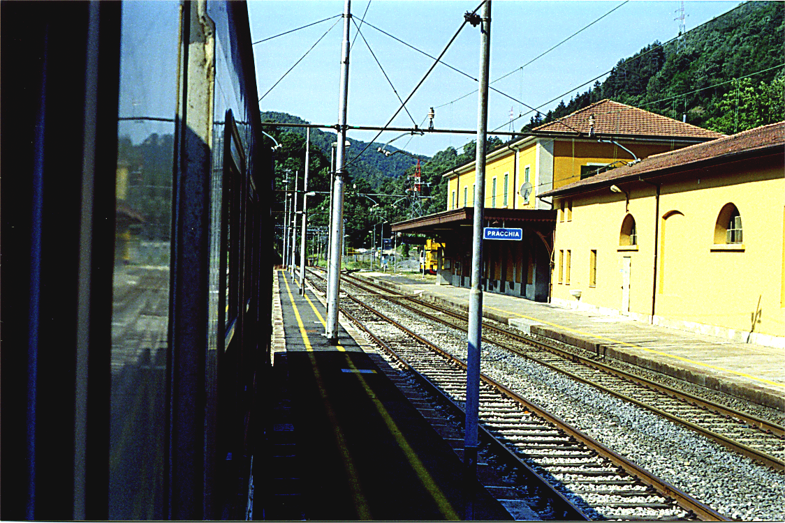 Stazione di Pracchia dal treno in corsa. Foto del 5 luglio 2006 con clone Pentax reflex, 50 mm fisso, pellicola 400 ISO, 1/125 secondo. Fatta da me.